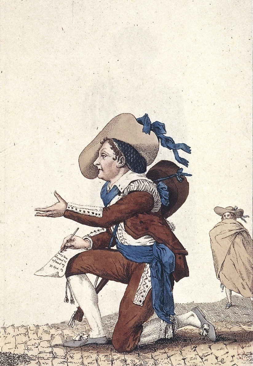 Joseph-Jean-Baptiste Albouy genannt Dazincourt (1747–1809) als Figaro in der Komödie "Le barbier de Séville" von Pierre-Augustin Caron de Beaumarchais (1732–1799), Théâtre-Français. Martinet (Paris). Kolorierte Radierung, 23 x 14,5 cm. Bibliothèque nationale de France. (Im Hintergrund Graf Almaviva. Figaro schreibt: "Le vin et la poésie se partagent mon cœur." Unterhalb des Bildes steht: "Si l‘une est ma maîtresse, l’autre est mon serviteur. Acte 1er, Scène 2me.")